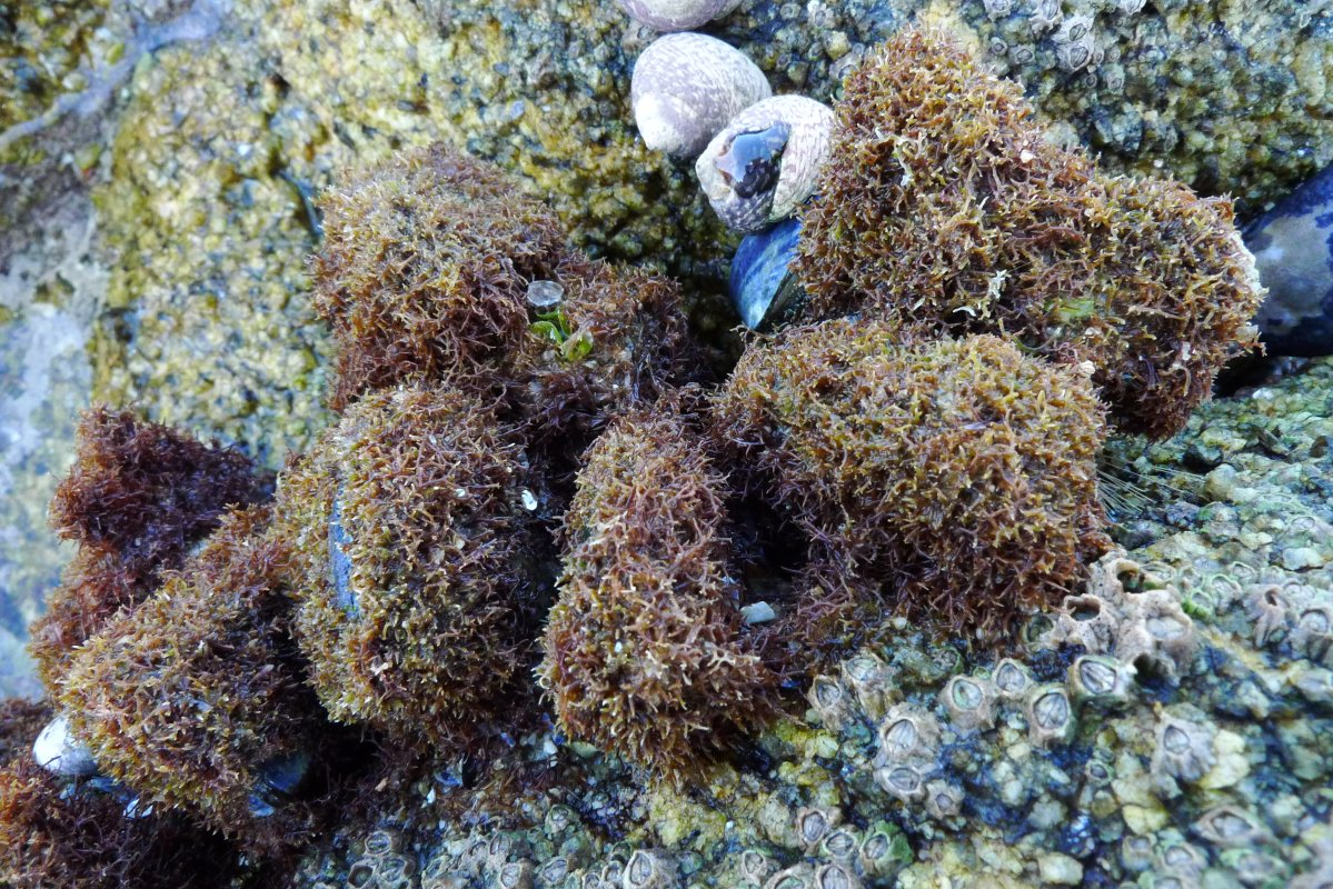 Caulacanthus ustulatus, Gâvres (Morbihan, Bretagne, France)